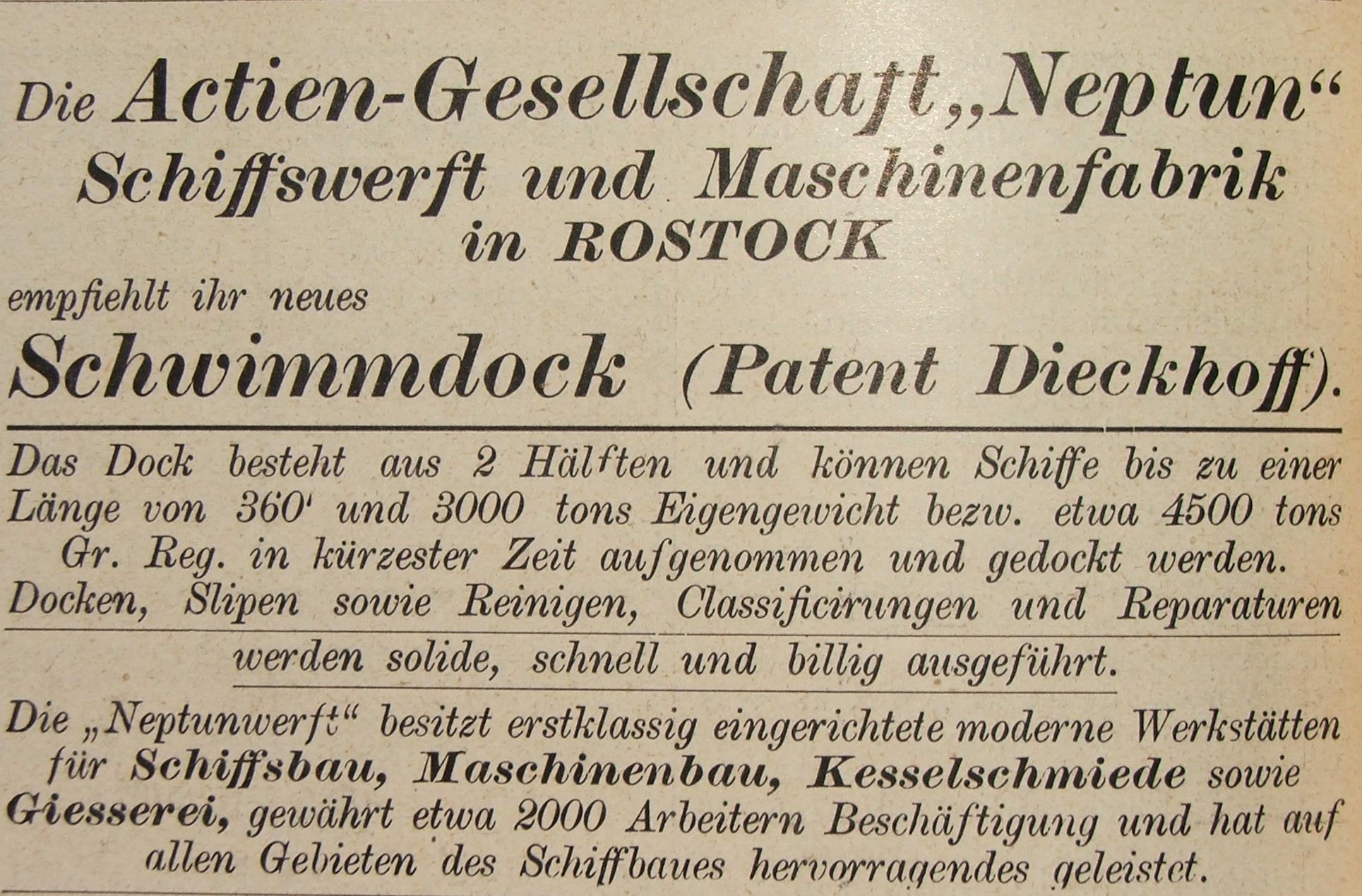 Annonce der "Neptun"-Werft 1913